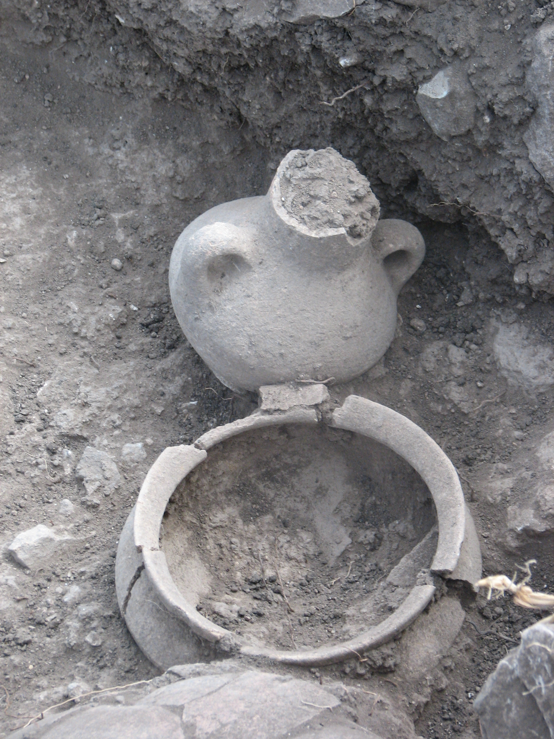 Tell Esur תל-אסור, שנמצא בפתחו המערבי של נחל עירון. התל נחפר על ידי הארכאלוג אדם זרטל בשנים 2001-2003 וכן על ידי שי בר מאוניברסיטת חיפה בשנת 2010 כלים מהמאה ה-13 לפני הספירה שנמצאו באתרם. קנקנית וסיר בישול